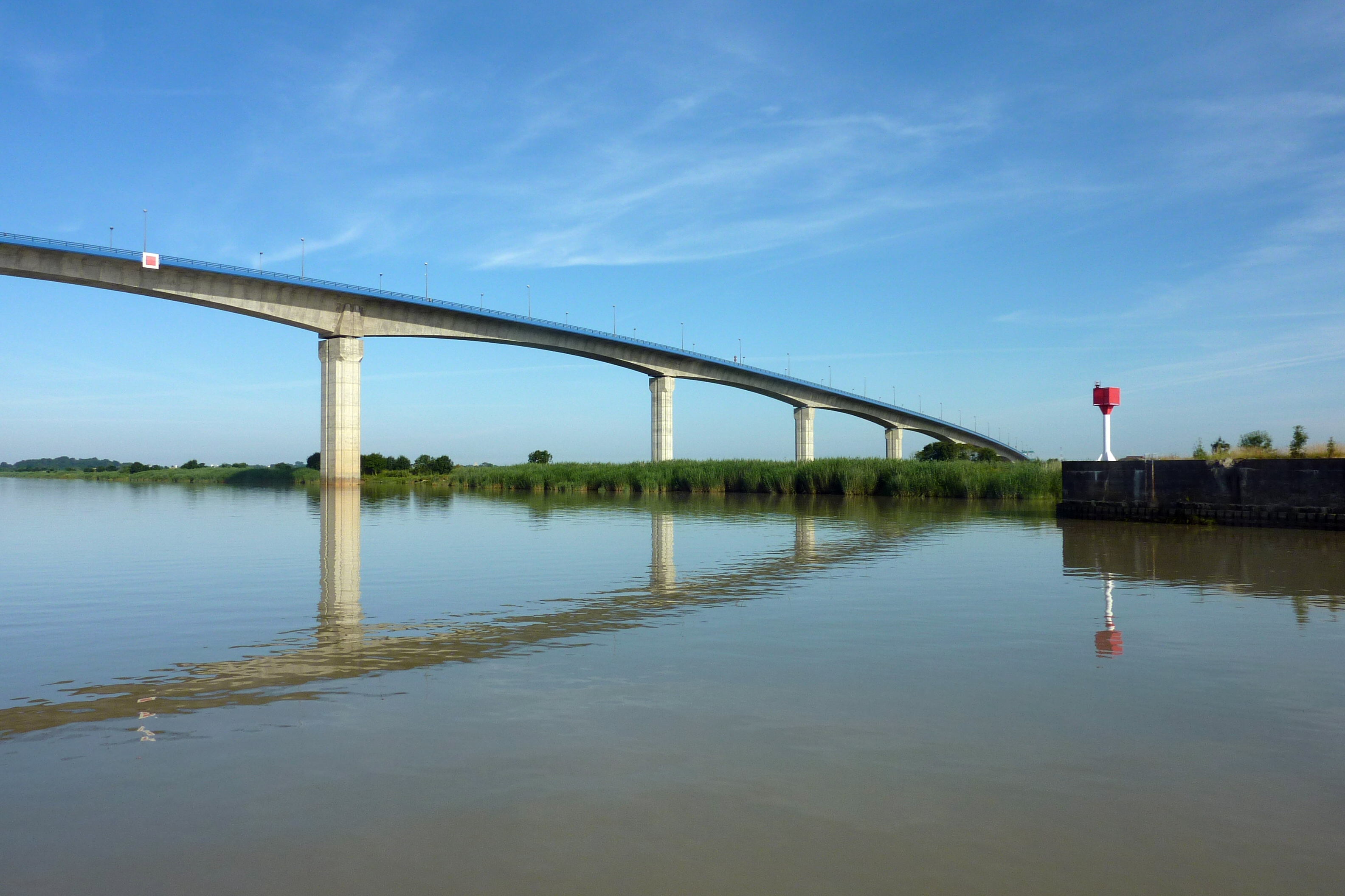 Viaduc de Martrou Rochefort Charente-Maritime France